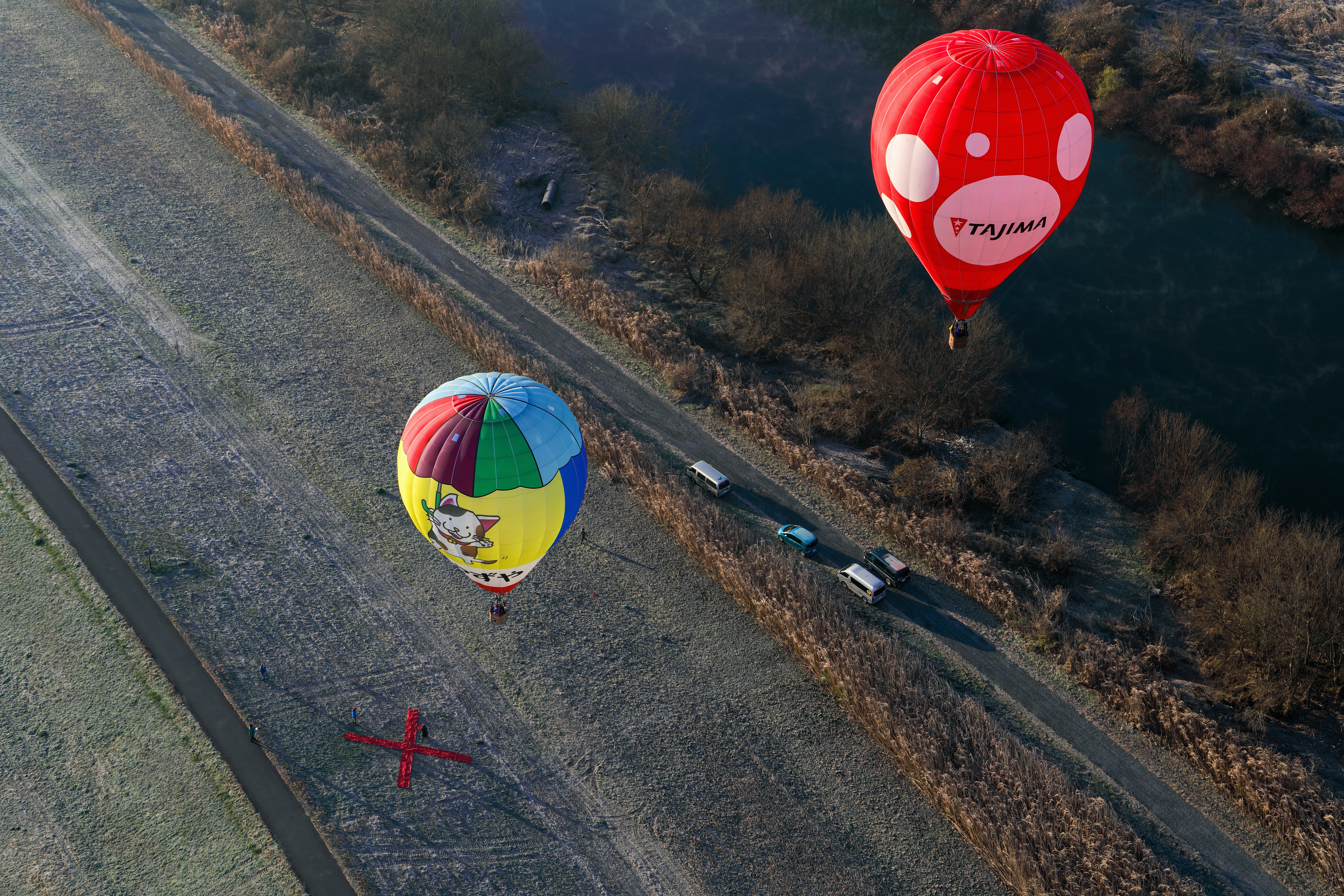 2017年に開催された、渡良瀬カップ「12月の風」で、ターゲットにアプローチする熱気球。